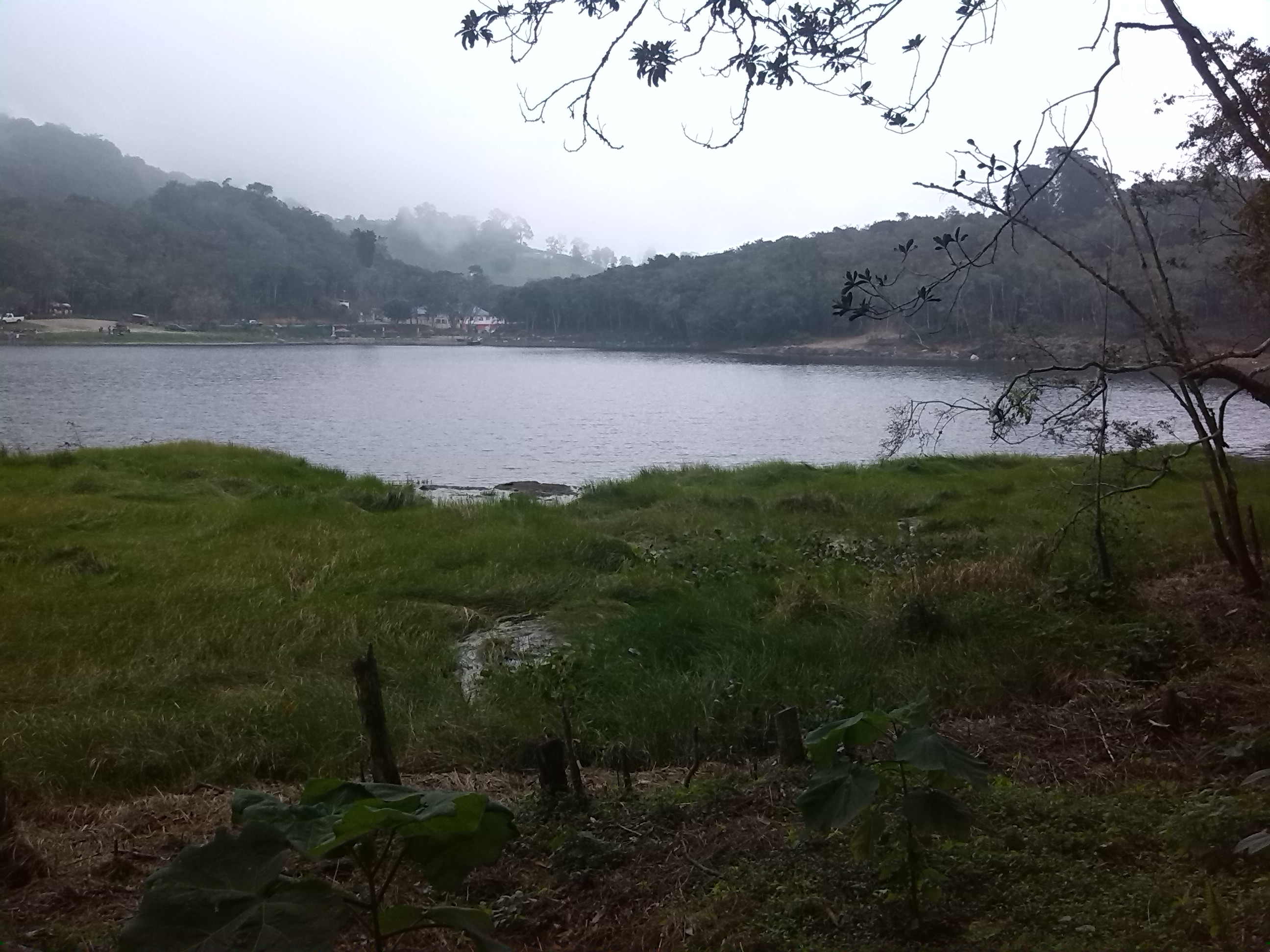 paisaje